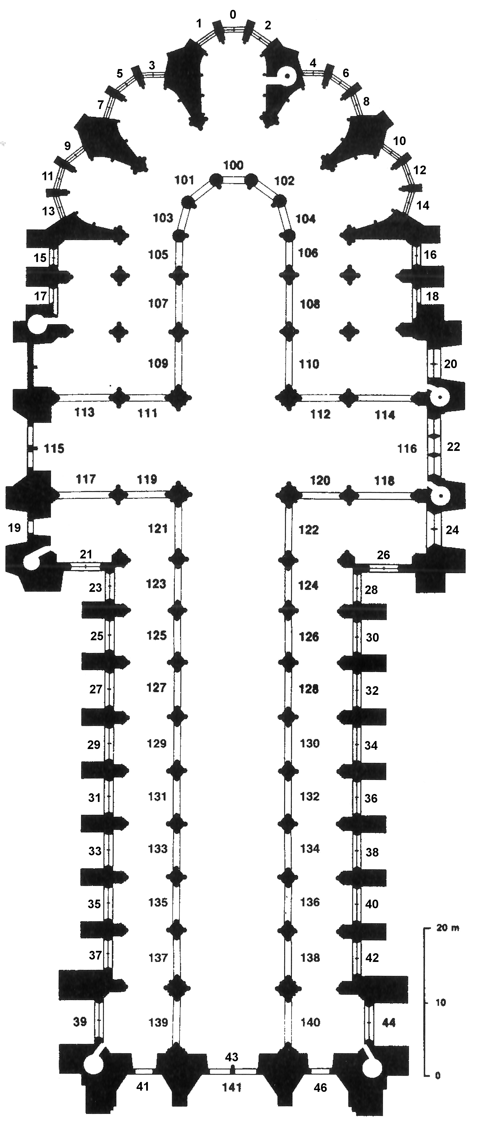 Plan de la cathédrale Notre-Dame de Reims avec la numérotation des baies selon le Corpus Vitrearum.ermission=